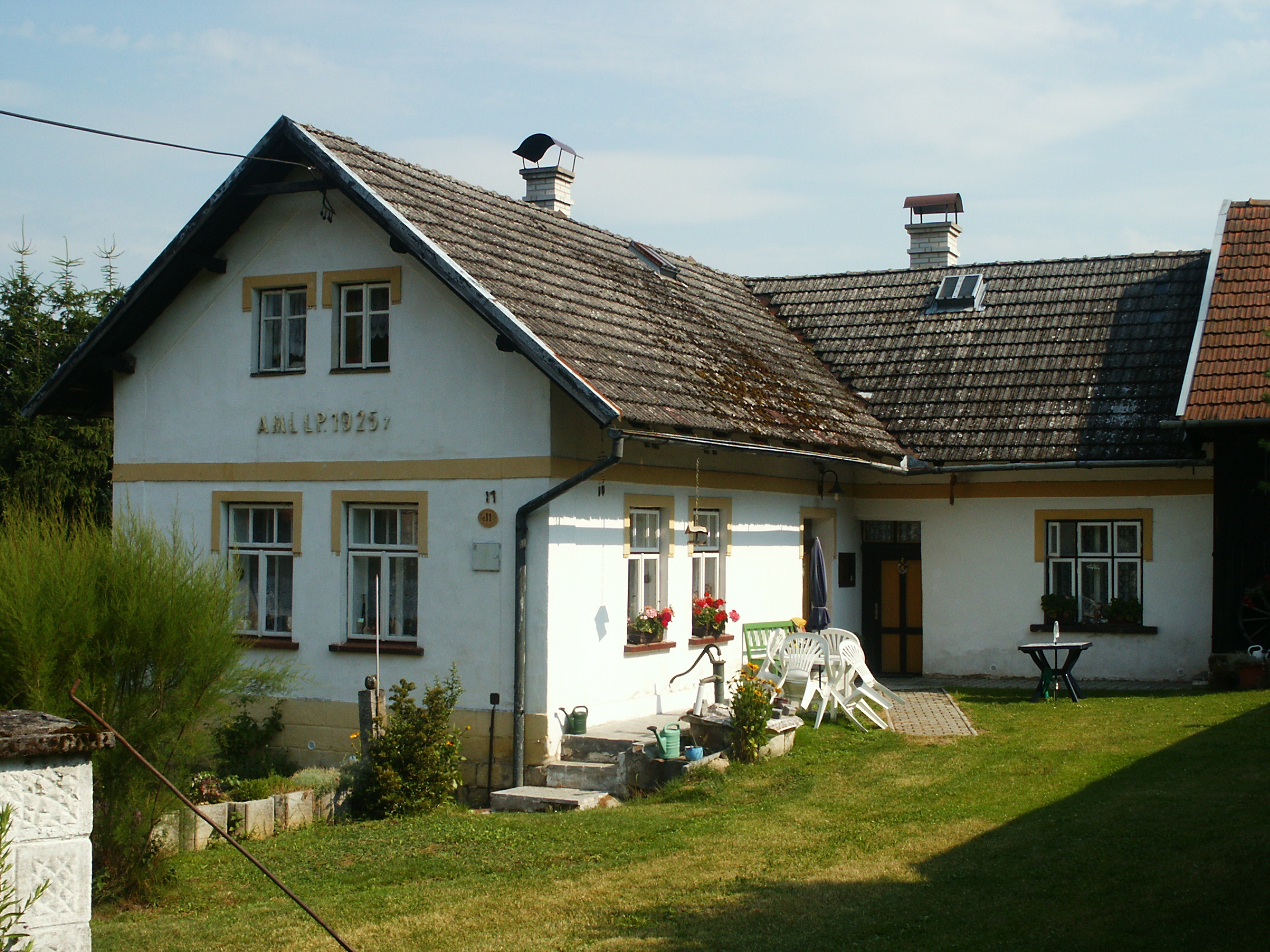 Betlem - č.p. 11